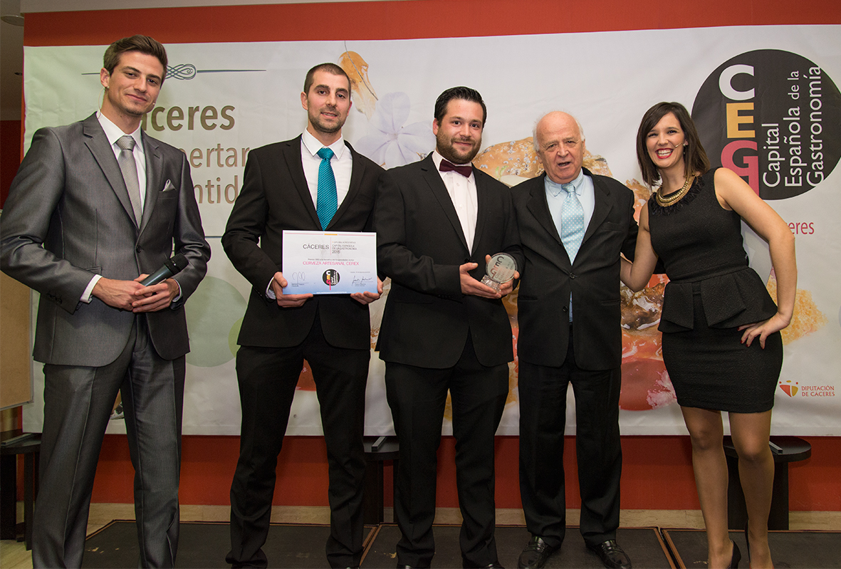 Premio Iniciativa Empresarial Junior